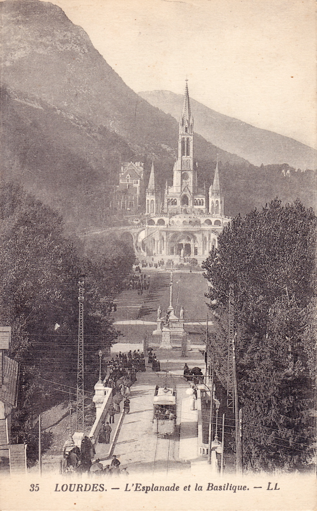 Carte postale ancienne éditée par LL n°35 : LOURDES - L'Esplanade et la Basislique